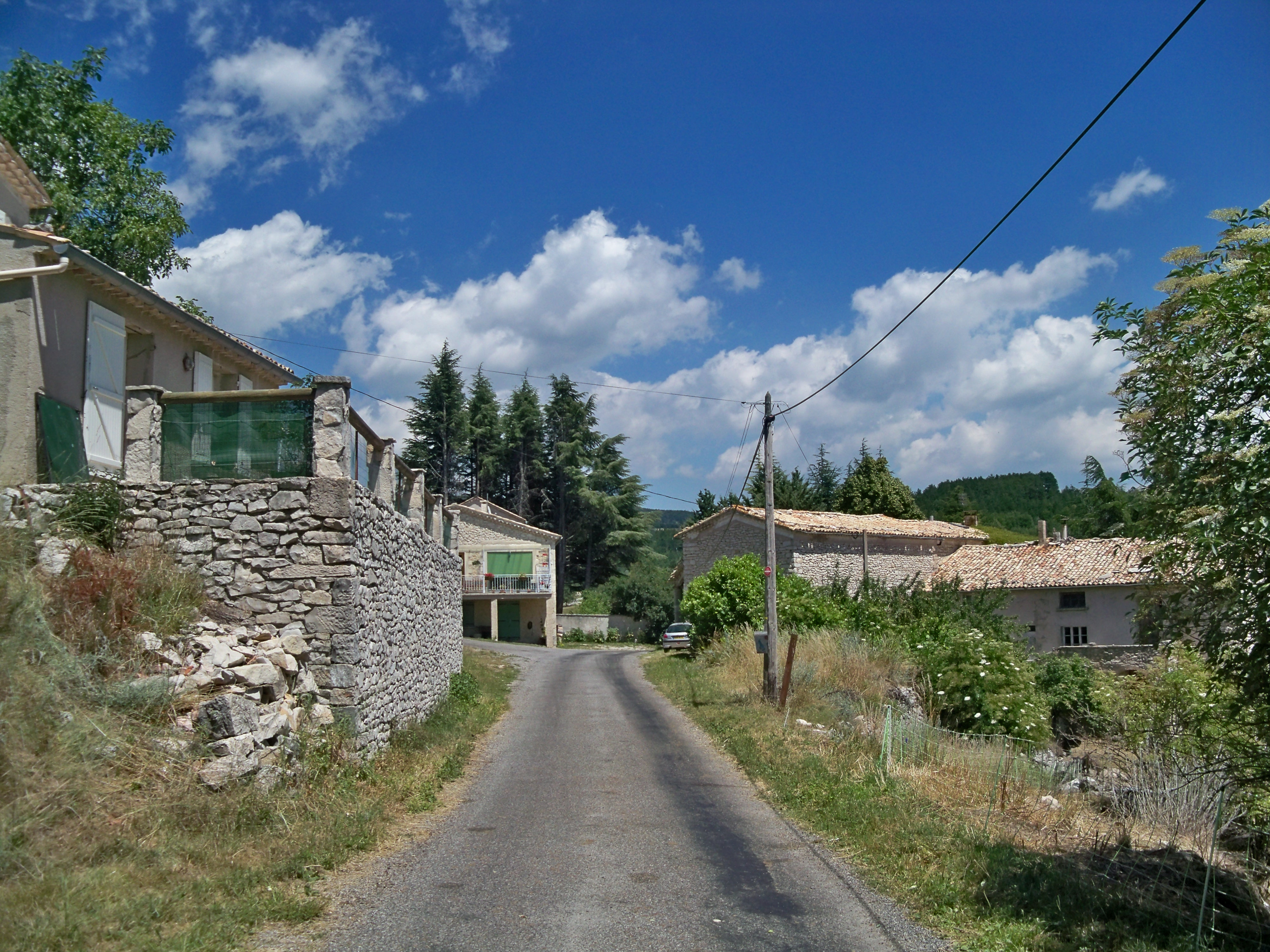 Hameau du Contadour, commune de Redortiers